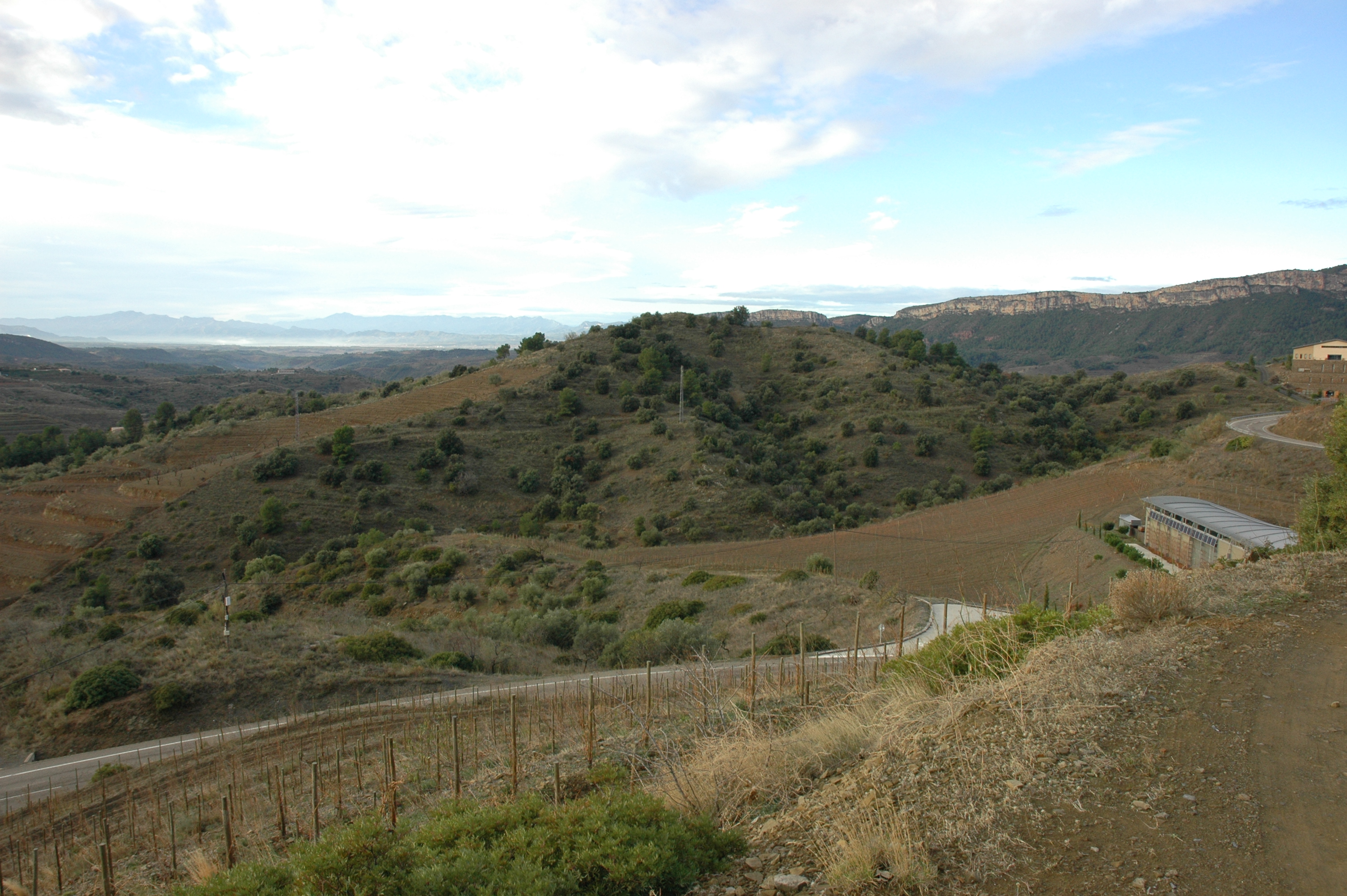 Gratallops - Coll de la Vaca